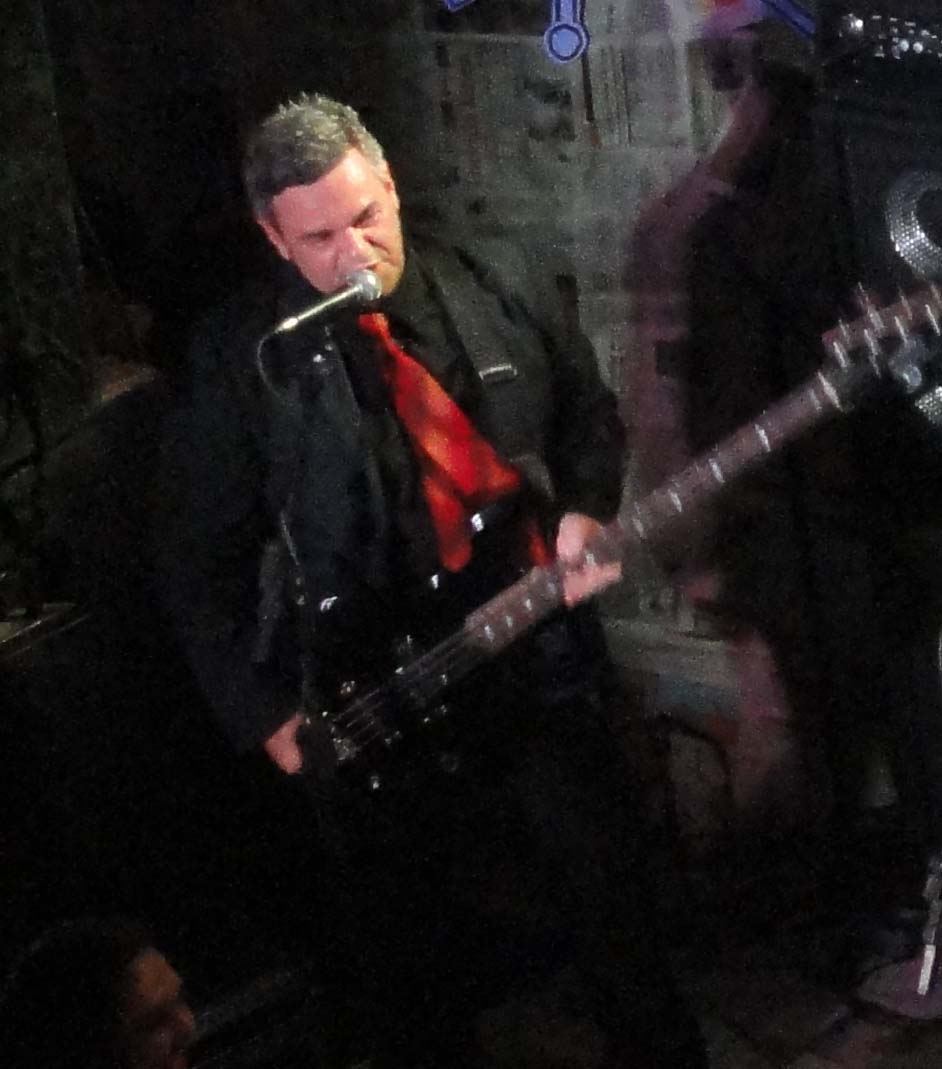 Graforréia Xilarmônica no bar Ocidente - Frank Jorge